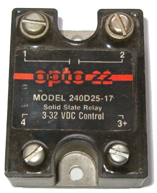 Optočlen.